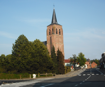 De kerk staat in het centrum van Wechelderzande